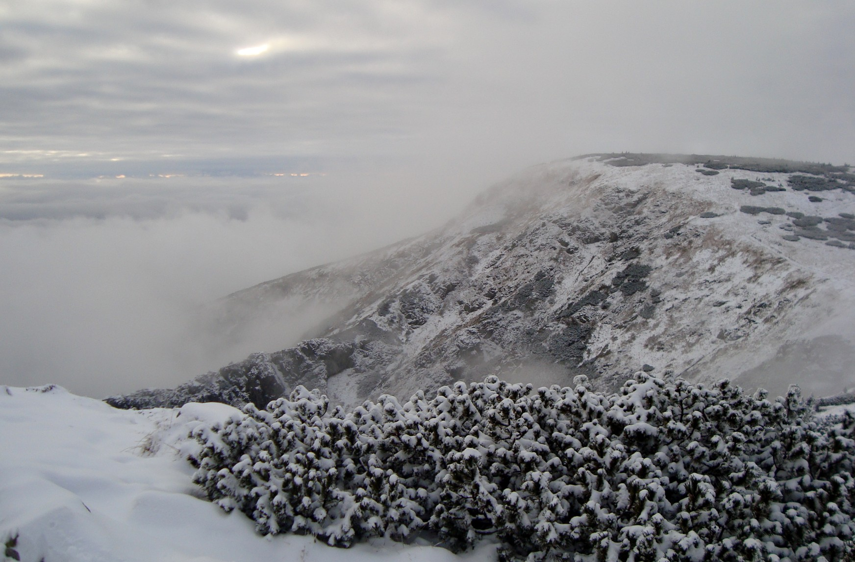 Krkonoše - vrchol Kotel.